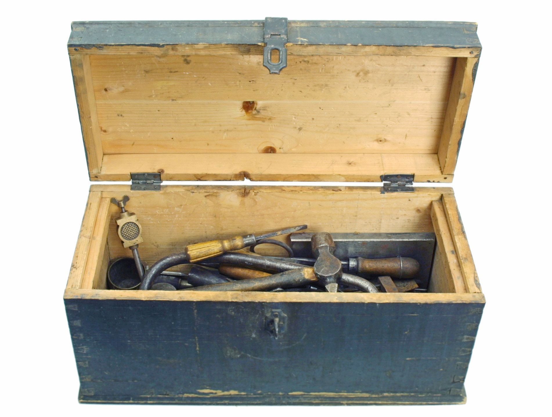 Photo by Reetta Tervakangas, Vapriikki Photo Archives